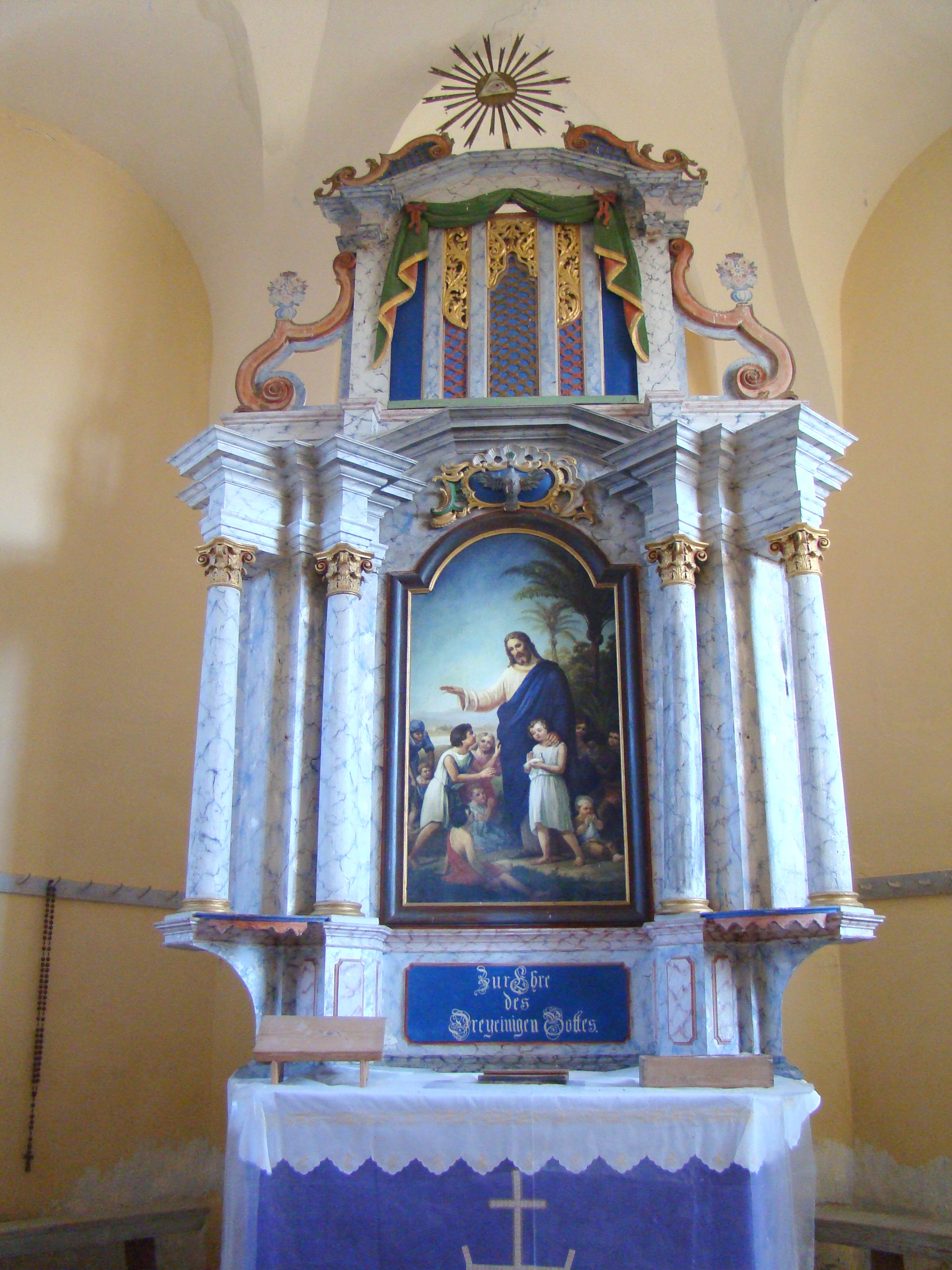 Biserica evanghelică, sat Rodbav; comuna Șoarș 115 sec. XIII-XIX